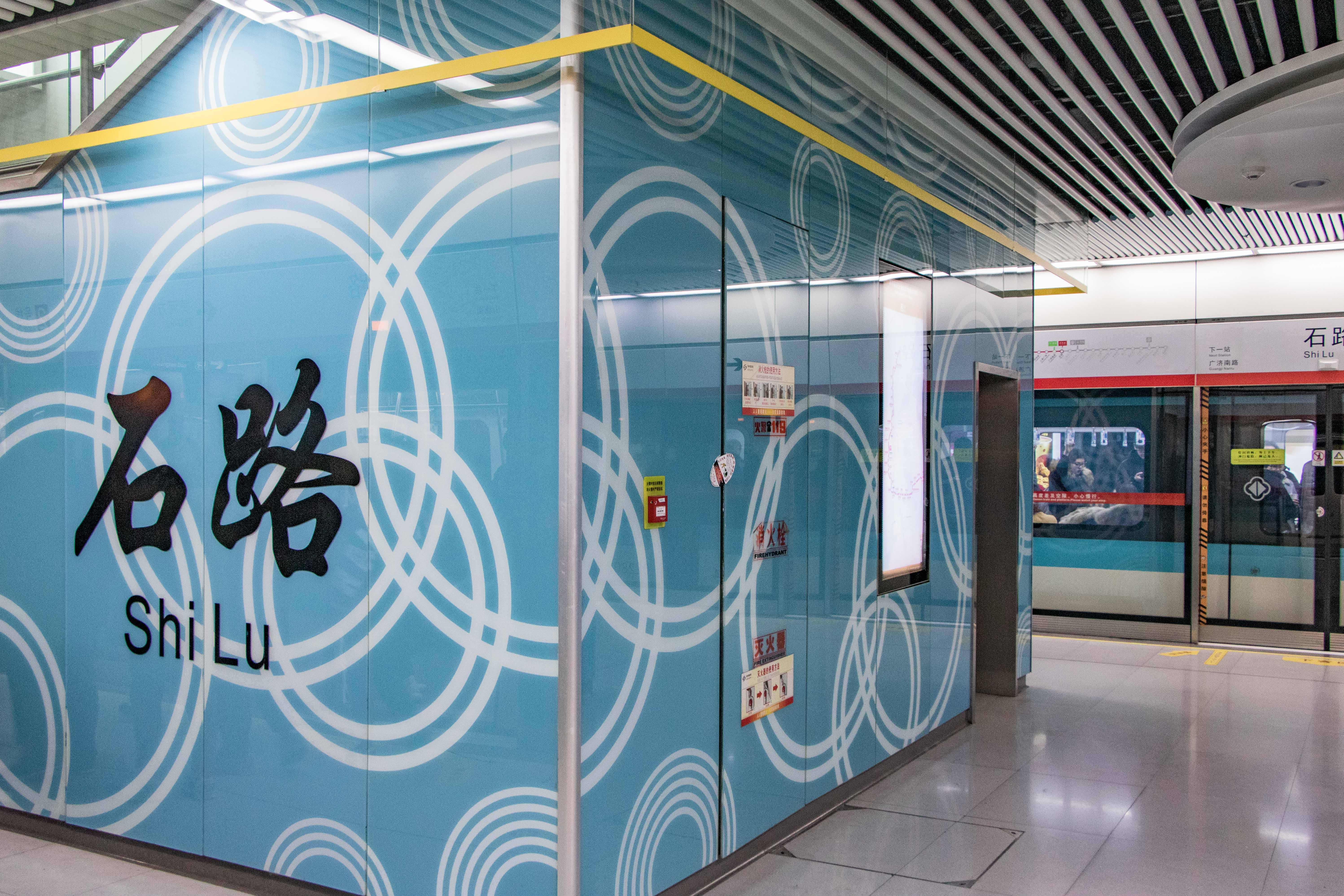 中文（中国大陆）: 石路站站名壁